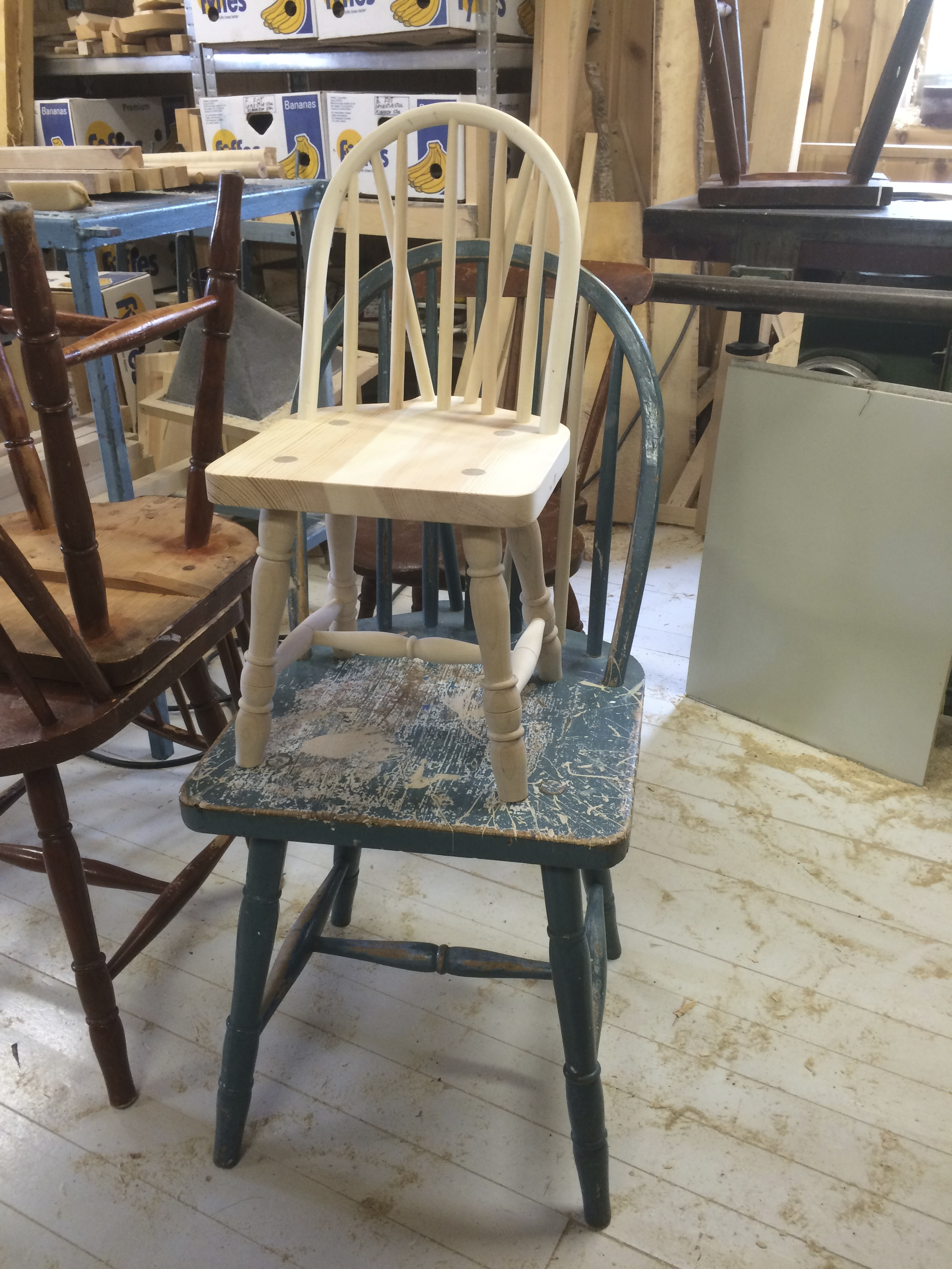 Budalstoler som skal repareres. Den minste er en ny barnestol. John Tovmos verksted (2016)